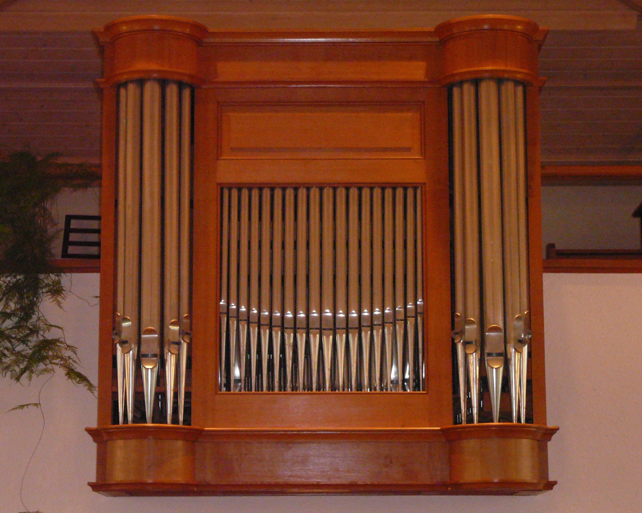 Römisch-katholische Pfarrkirche St. Josef Glattfelden, Orgel